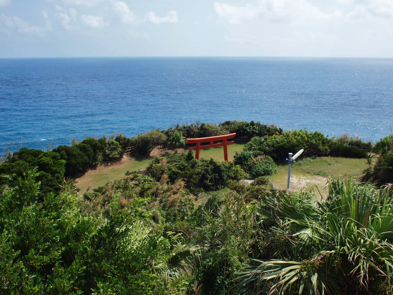 岬の南端。手前に御崎神社の鳥居が見える。